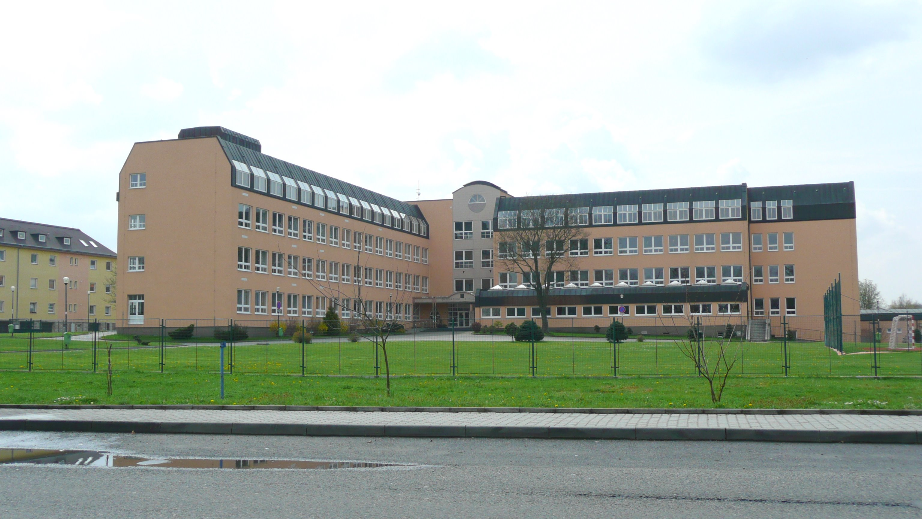 Česky: Gymnázium Sokolov (GYMSO), Husitská 2053.